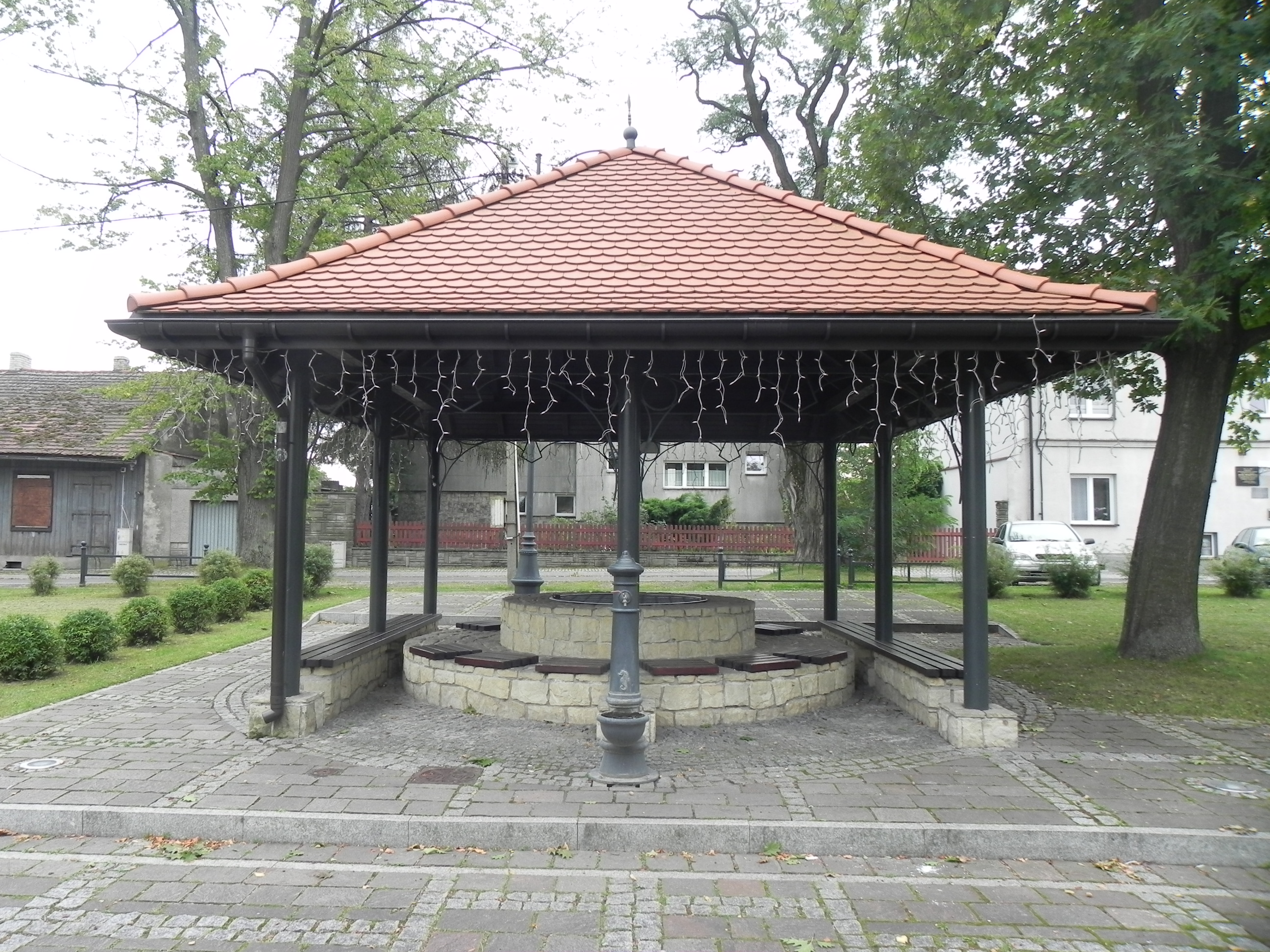 Alwernia, Zespół architektoniczno-przestrzenny wsi